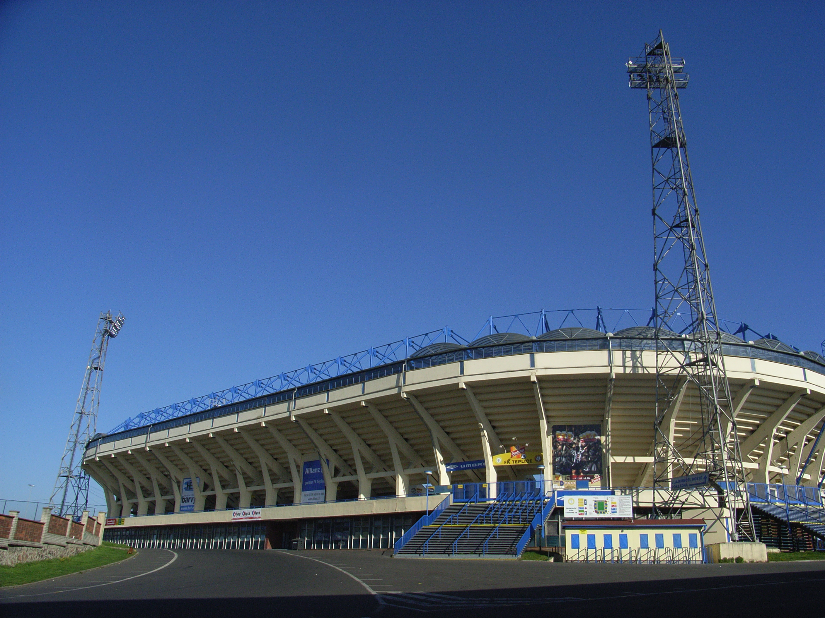 Stadion Na Stínadlech v Teplicích.